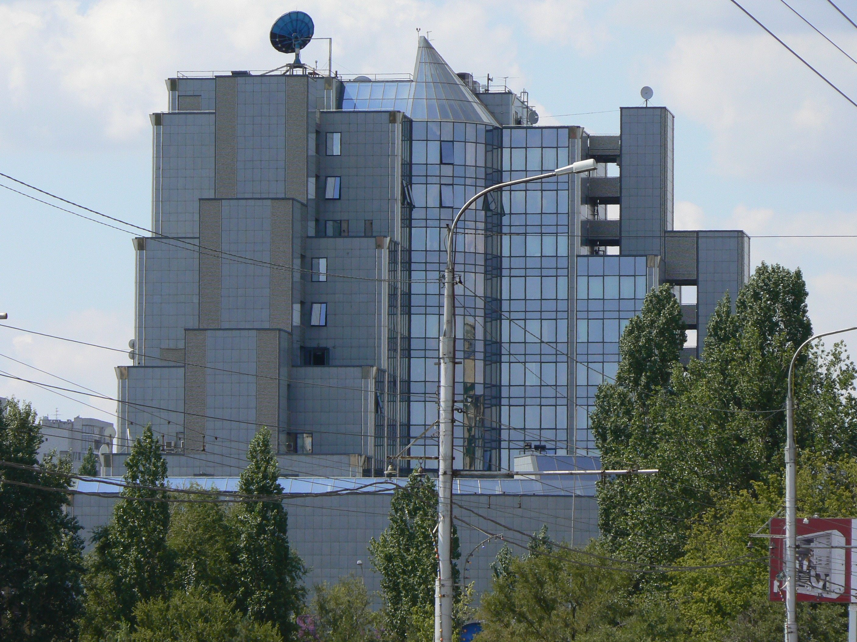 Выставочный центр Меркурий в Ворошиловском районе Волгограда